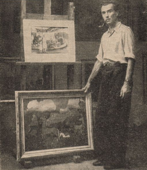 Lev Šimák, český malíř, grafik a publicista